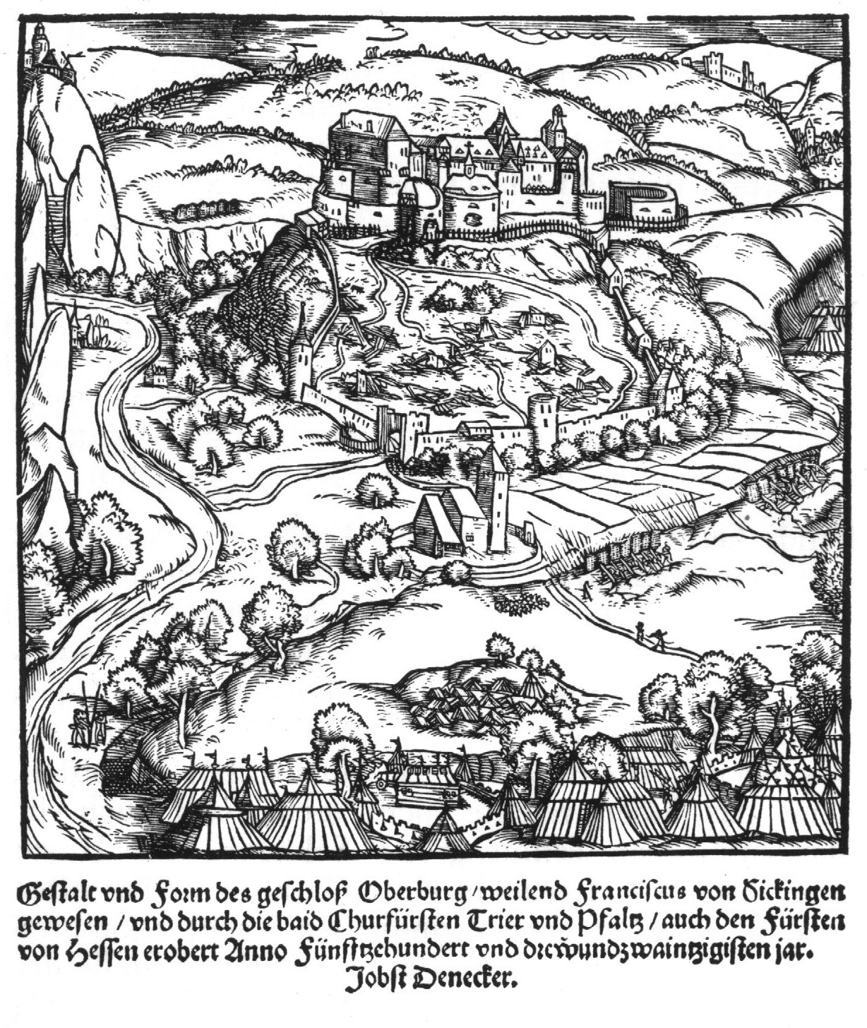 Gestalt und Form des Geschloß Oberburg/weilend Franciscus von Sickingen gewesen / und durch die baid Churfürsten Trier und Pfaltz / auch den Fürsten von Hessen erobert Anno Fünfzehnhundert und dreiundzwanzigstem jar. (Im Hintergrund links: Rheingrafenstein, rechts: Altenbaumburg)